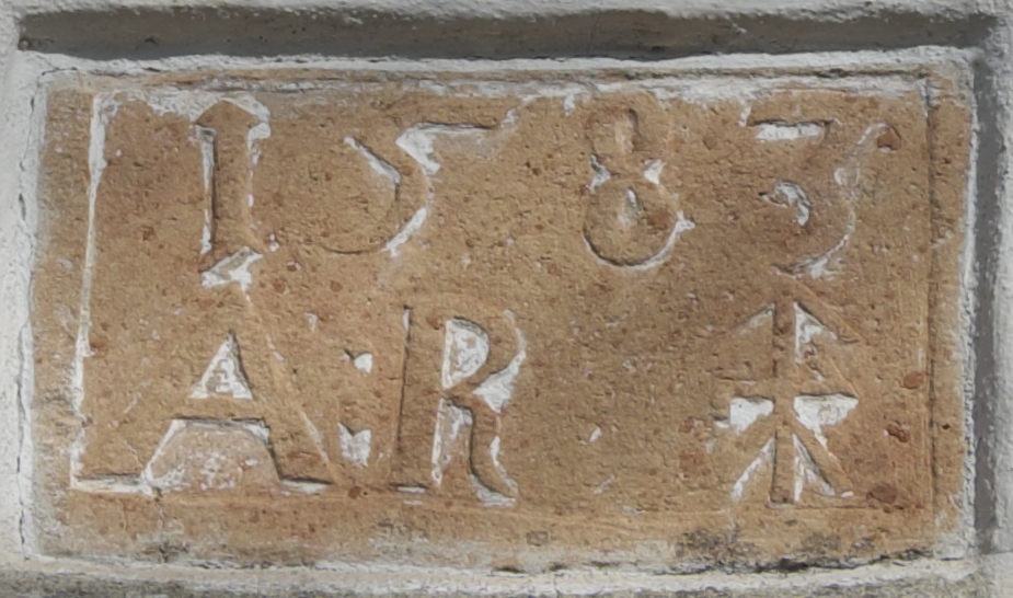 Katholische Filialkirche St. Johannes der Täufer im Ortsteil Töllern in Weilheim in Oberbayern im Landkreis Weilheim-Schongau (Bayern/Deutschland)